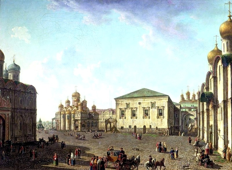 Ф. Я. Алексеев. «Площадь перед Успенским собором в Московском Кремле». Не ранее 1800. Холст, масло. 56,5 × 78,5 см. Государственный Русский музей, Санкт-Петербург. “ Начало работы над серией московских видов относится к 1800 г., когда Ф. Я. Алексеев на средства Кабинета Е. И. В. во второй половине сентября был командирован в Москву. Эта и две другие картины («Площадь в Московском Кремле» и «Вид Московского Кремля со стороны Каменного моста»), очевидно, были написаны художником в Петербурге на основании эскизов, сделанных в Москве. В ГИМ находится подобная работа большего размера с несколько измененной композицией переднего плана («Соборная площадь в Москве с Грановитой палатой». 80 × 106). ” —Аннотация ГРМ